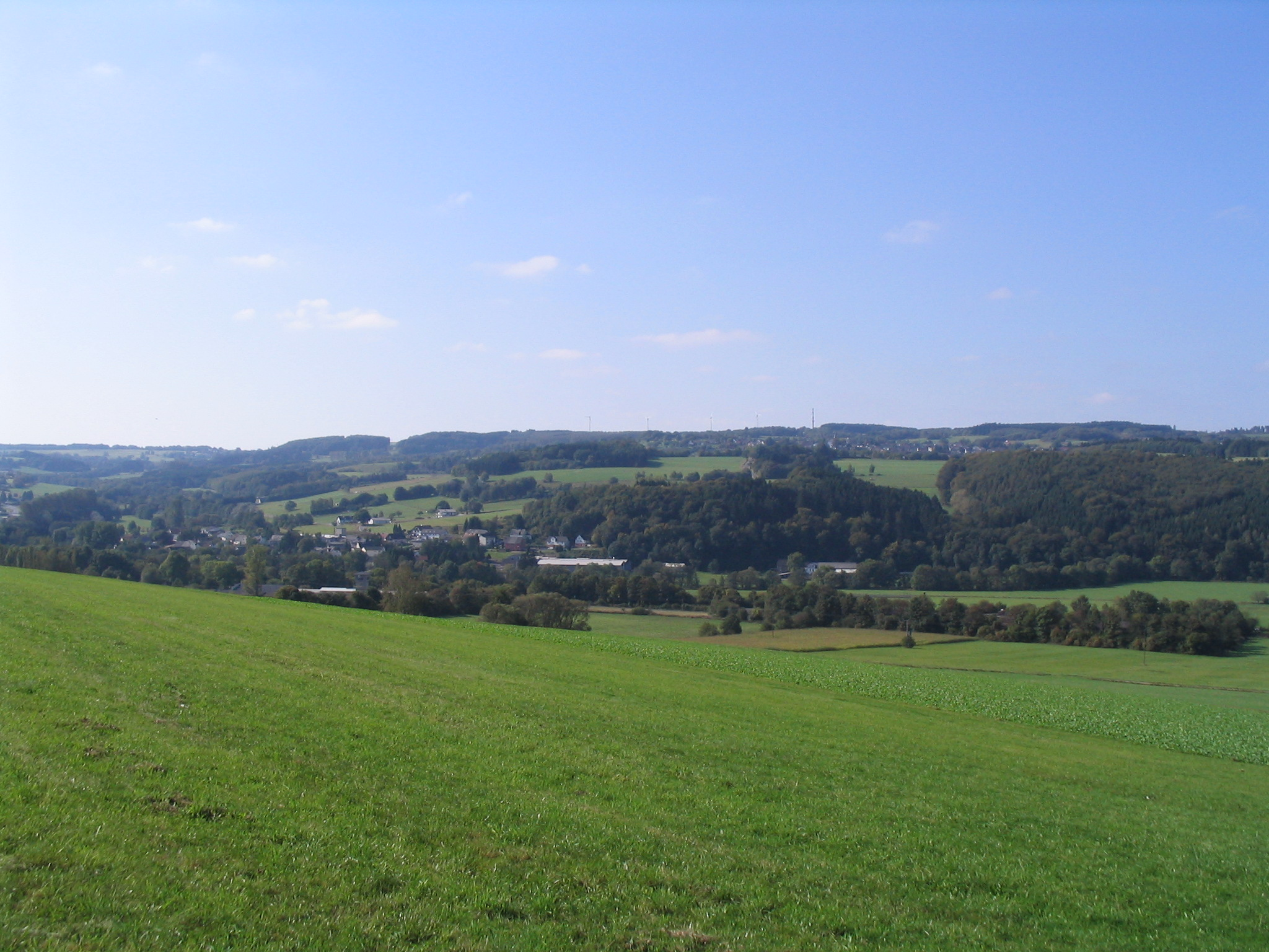 Der Gräbersberg im Westerwald von Nordosten